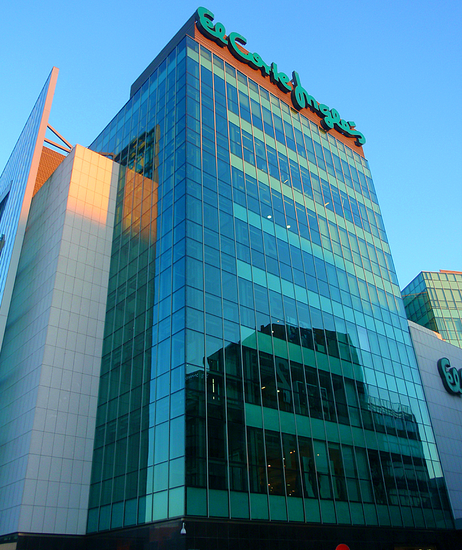 Porto (Portugal)